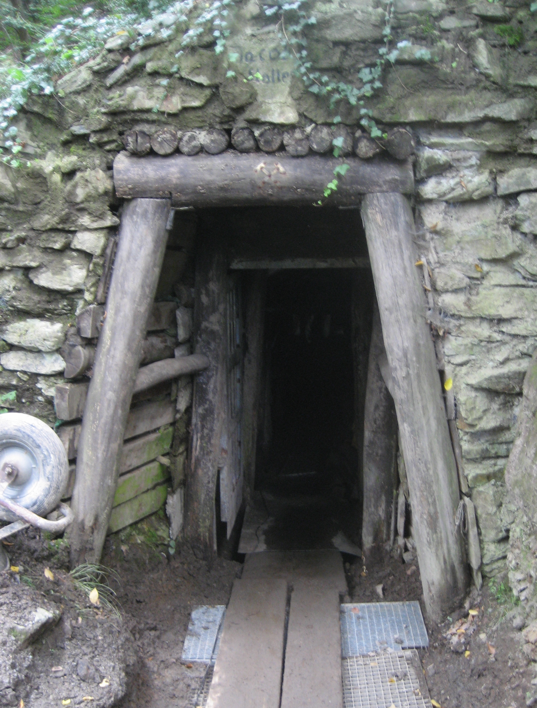 Mundloch des Jakobsstollen (St.-Jakob-Stollen) in Remscheid